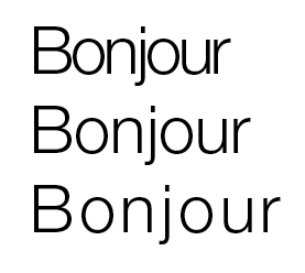 Exemple de chasse typographique